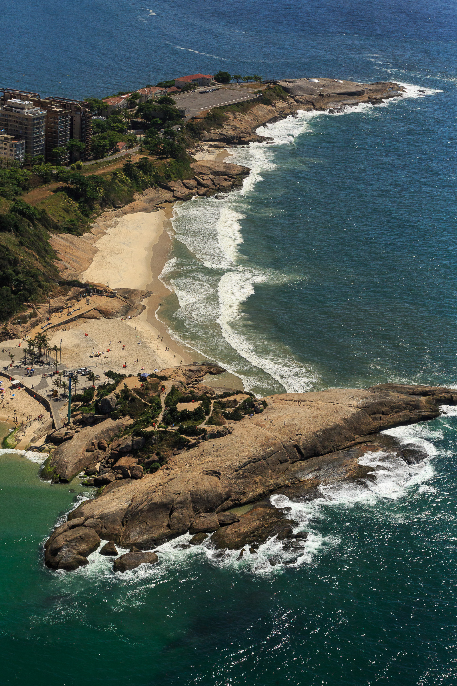 Vista aérea do Arpoador, localizado na cidade do Rio de Janeiro